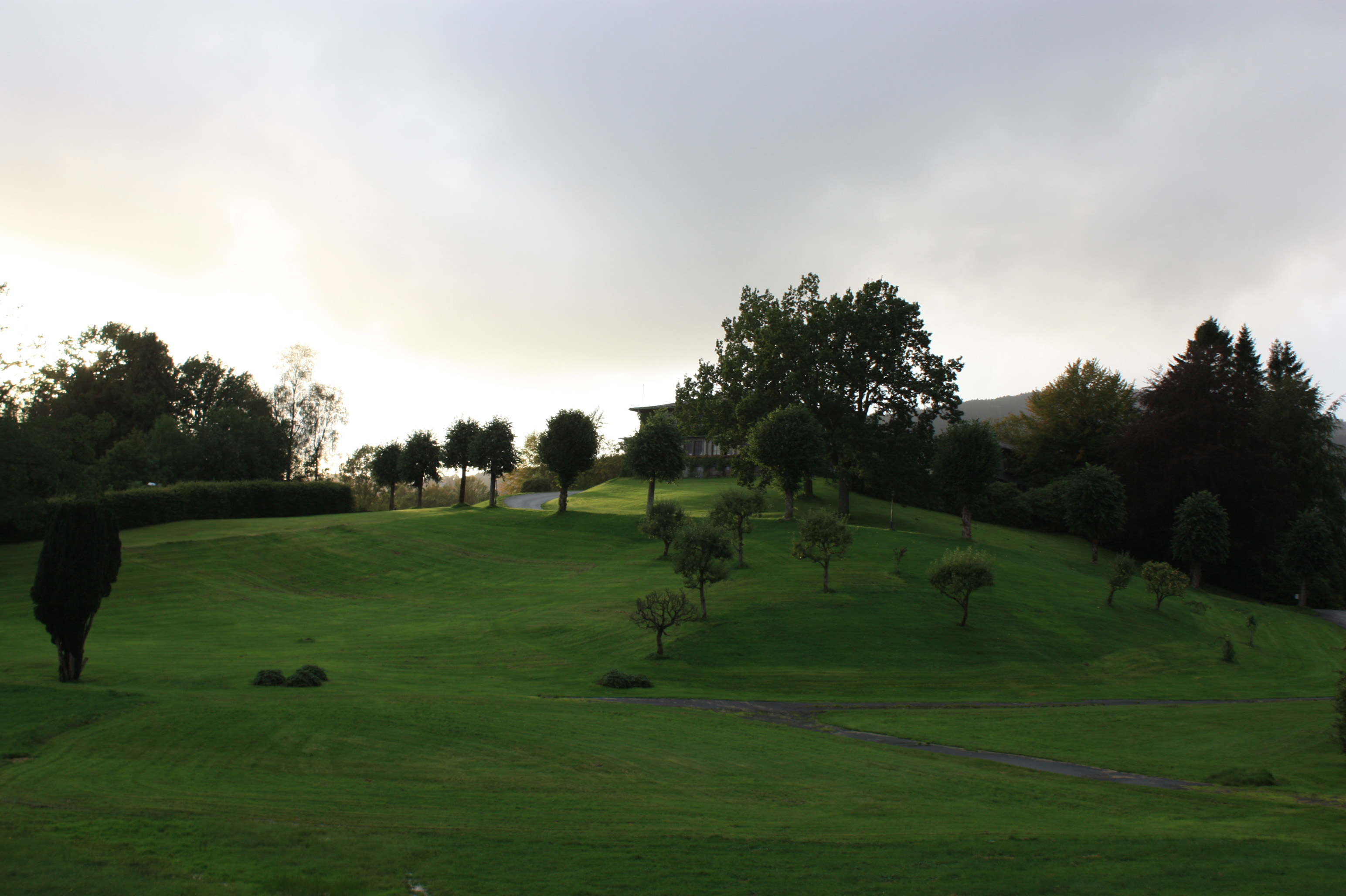 Jacob Kjødes A/S Bygningen, Fana, Bergen.